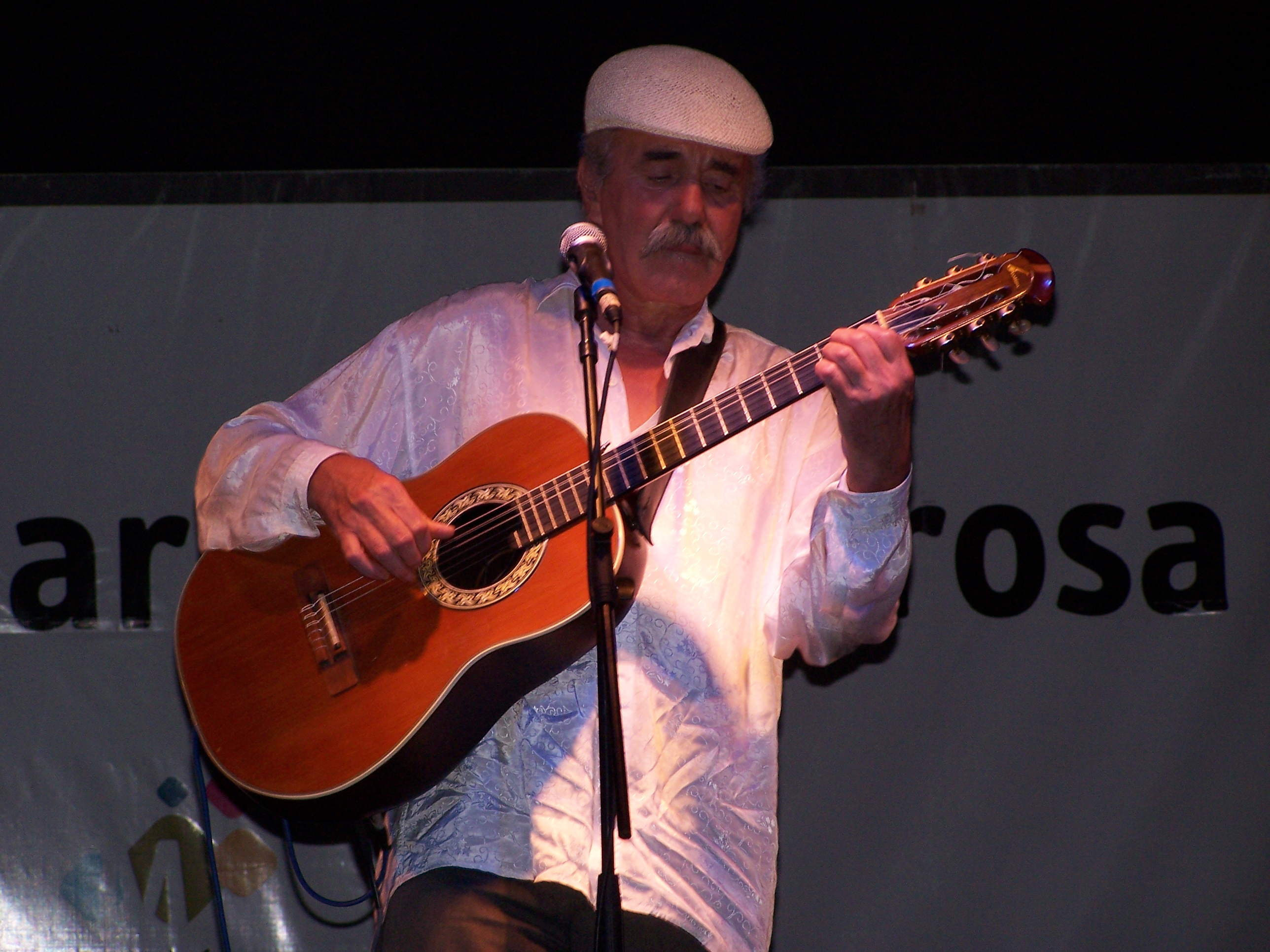 El cantautor uruguayo Roberto Darvin en una actuación en el escenario "Zitarrosa" en el marco de la Rural del Prado 2010.